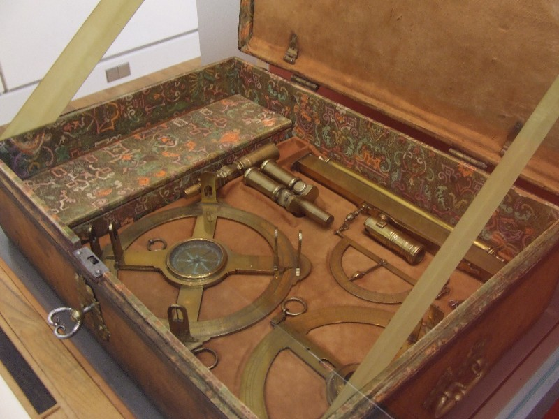 Messbesteck- und Reißzeugkoffer des Architekten Johann Maximilian Welsch, vor 1714, das noch ohne “von”. Holztruhe mit zwei herausnehmbaren Böden. Hier der unterste feste Boden, mit den schwersten Messinggeräten: ein Vollkreisdiopter, von Johannes Dickens gefertigt